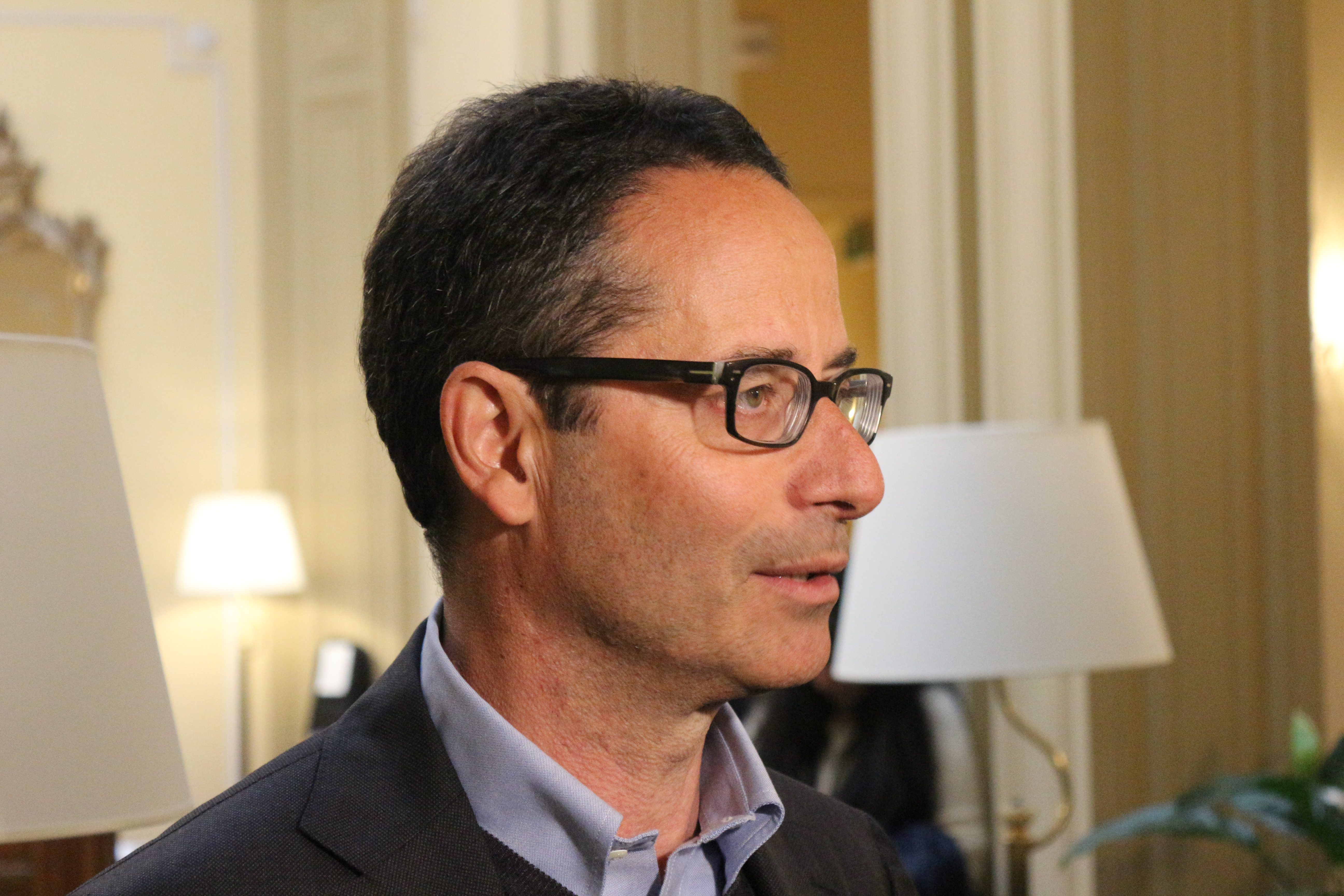 Luigi Contu intervistato durante il Festival del Giornalismo nel 2018